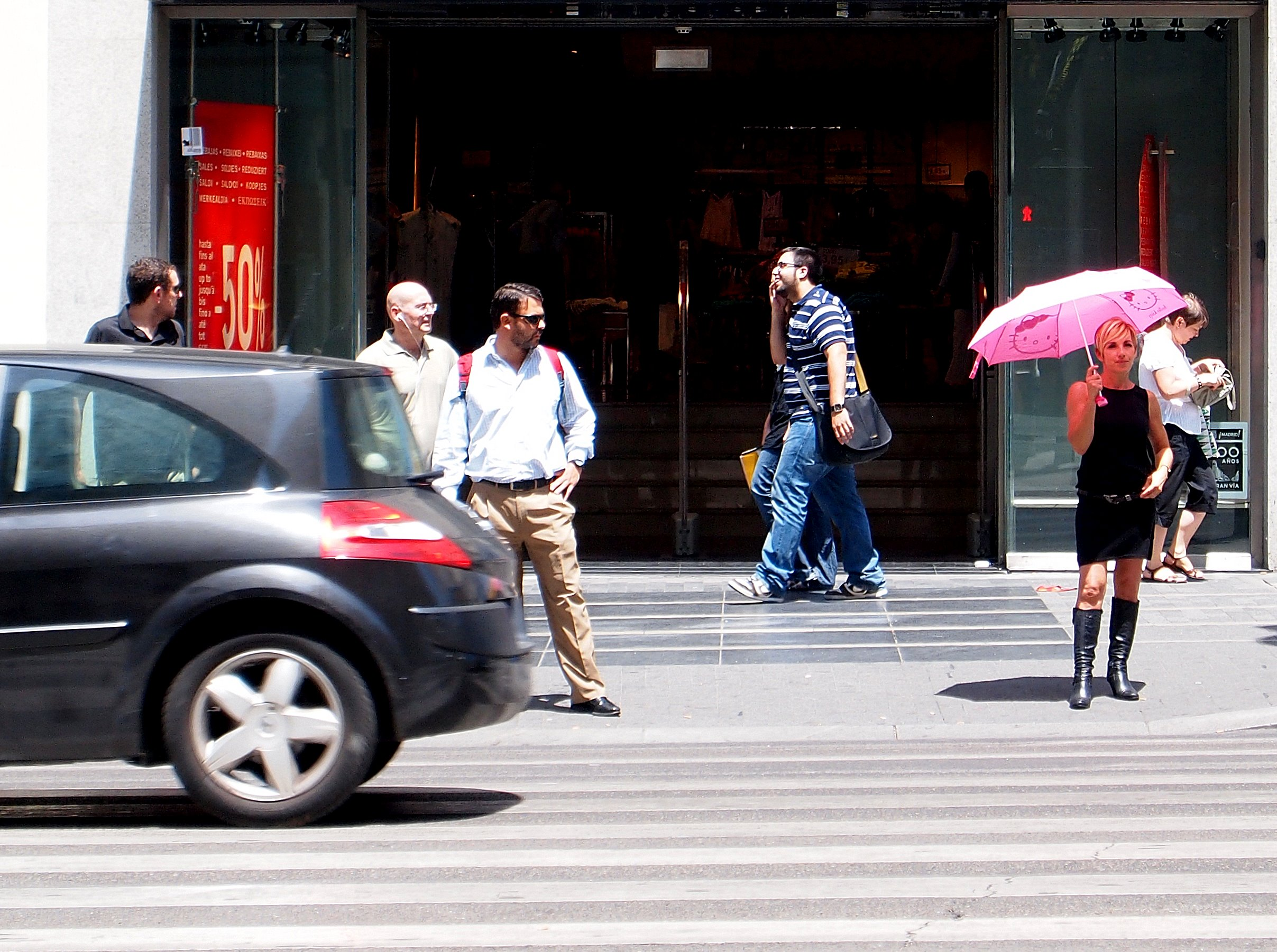 Ana Torroja